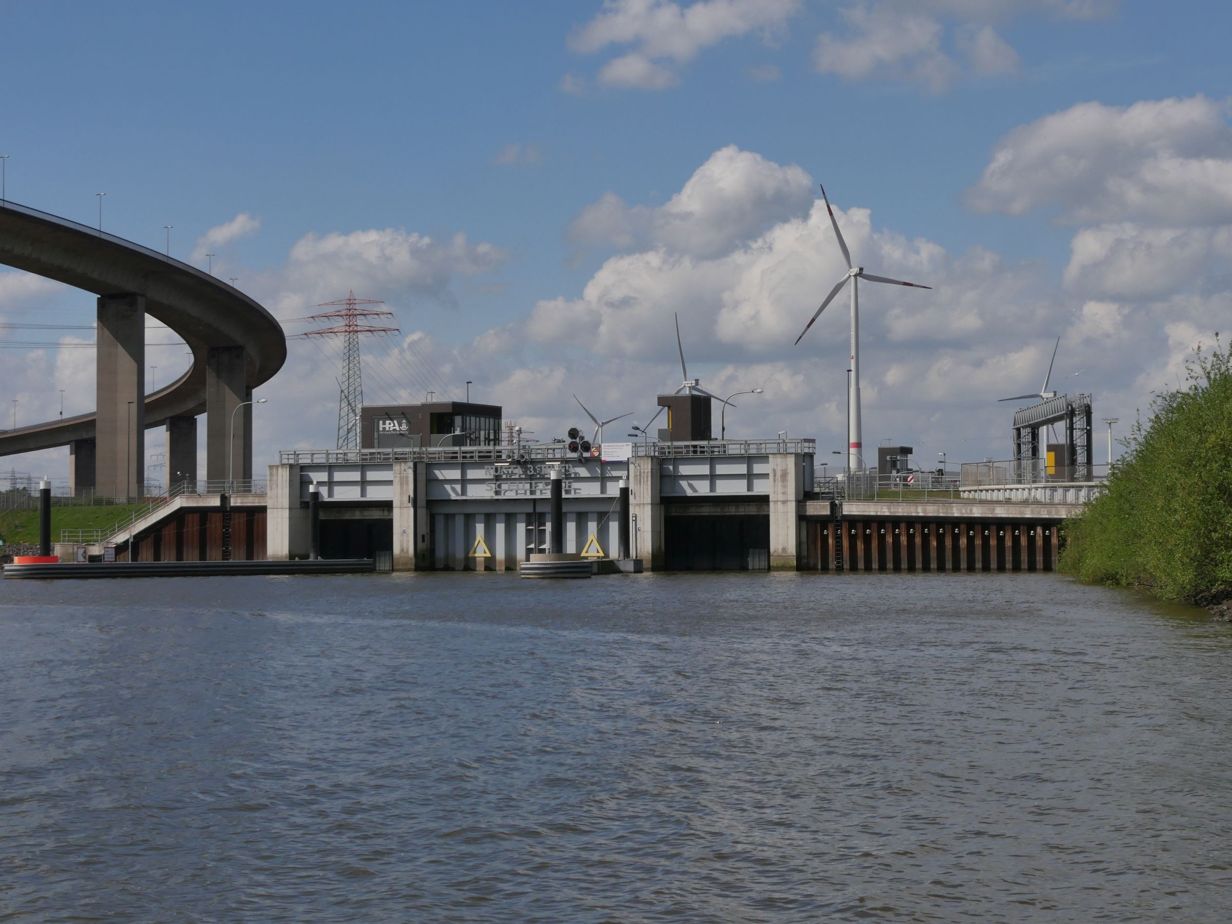 Rugenberger Schleuse